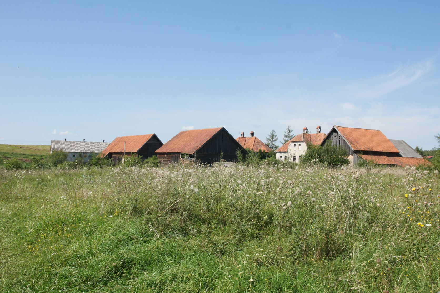 Królowa Wola, zagroda (dawny PGR ?)